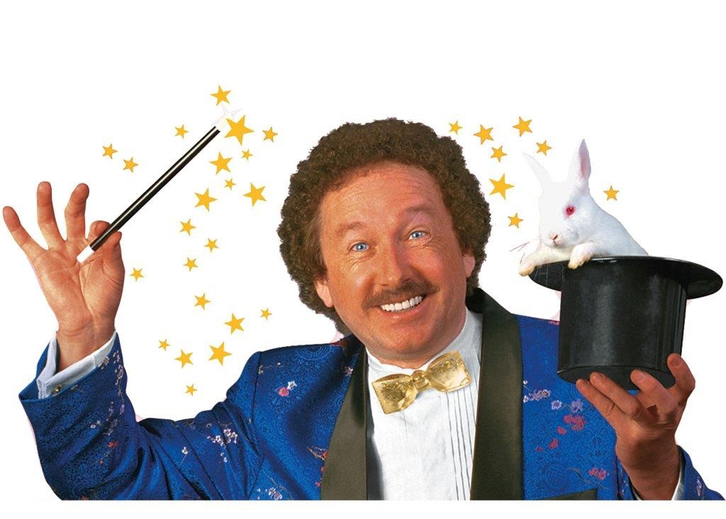 Der Zauberer Hardy